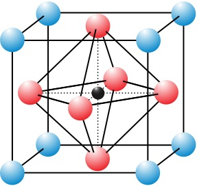 perovskite